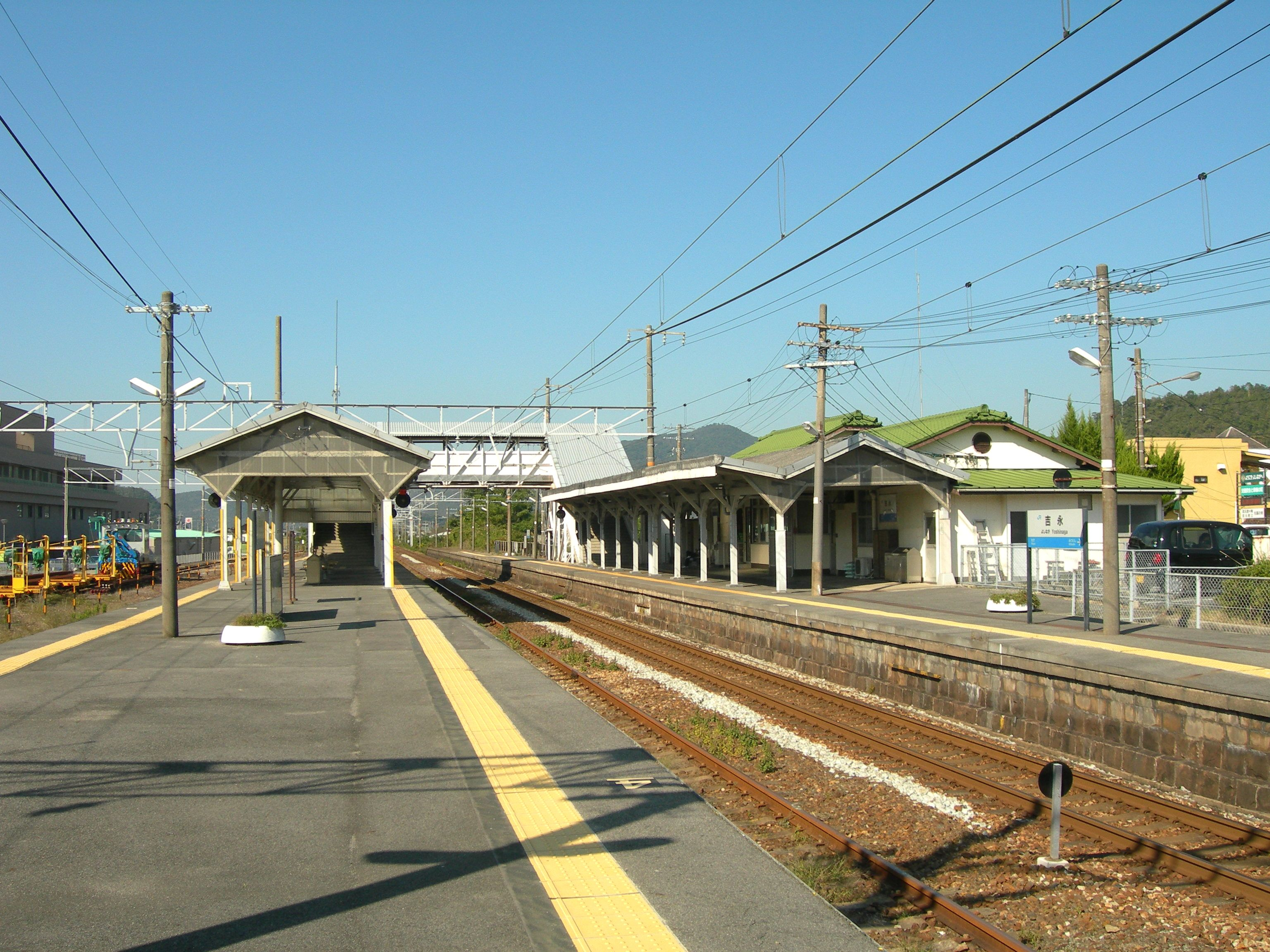 吉永駅ホーム